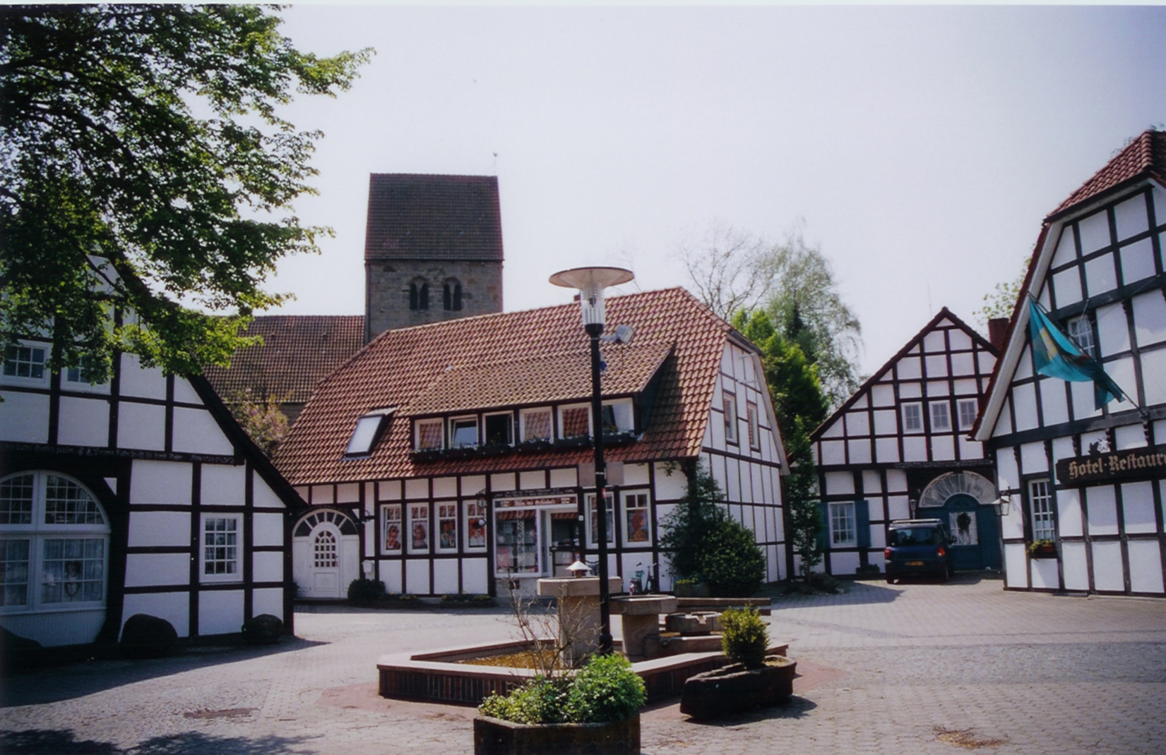 Blick vom Marktplatz auf ein Ensemble alter Fachwerkhäuser; im Hintergrund Turm der Evangelischen Kirche in Recke, Kreis Steinfurt, Nordrhein-Westfalen, Deutschland.